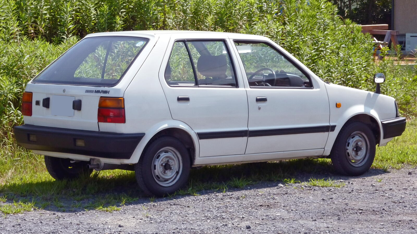 日産・マーチ（初代・中期型）